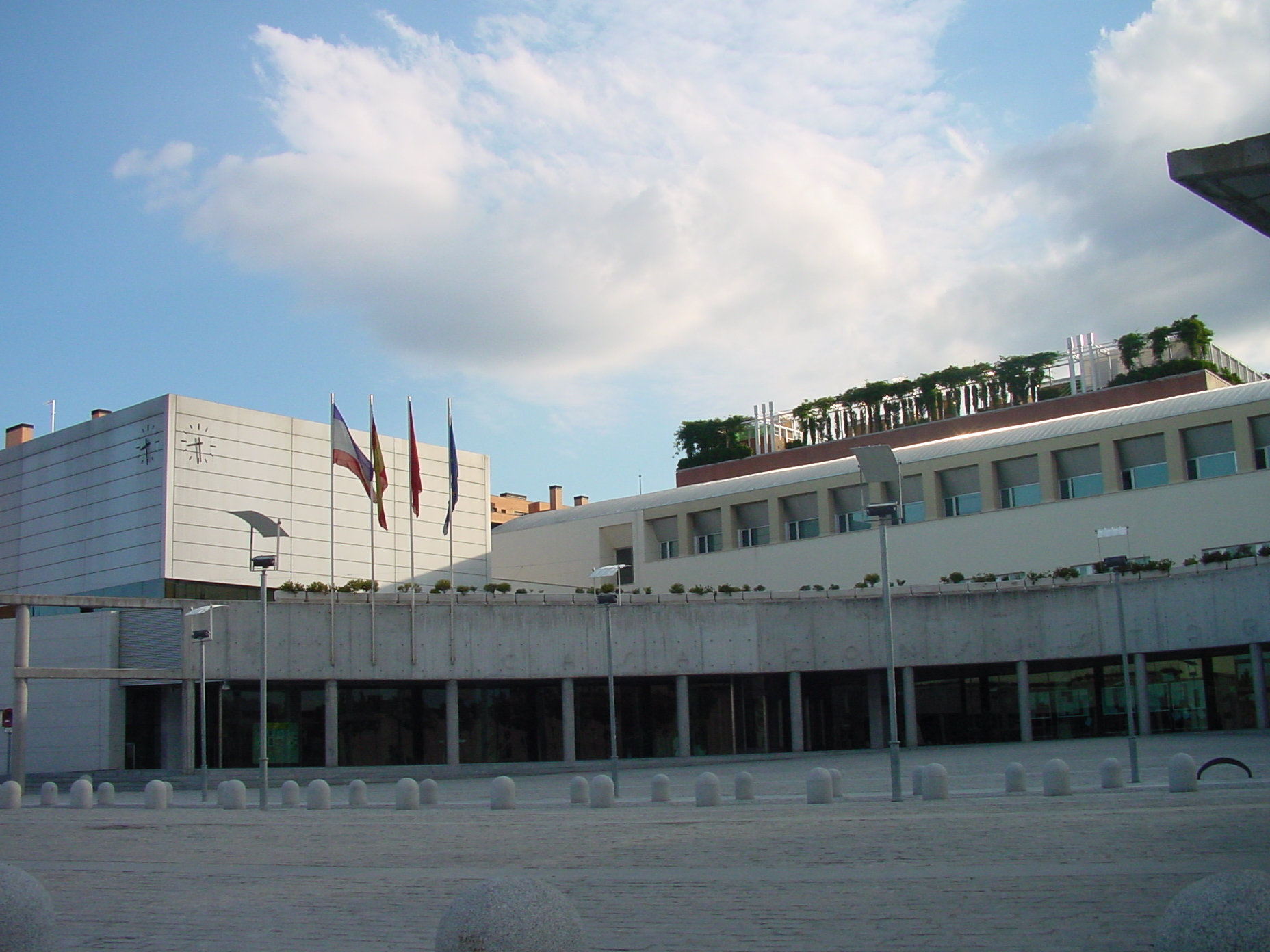 Ayuntamiento de Tres Cantos.